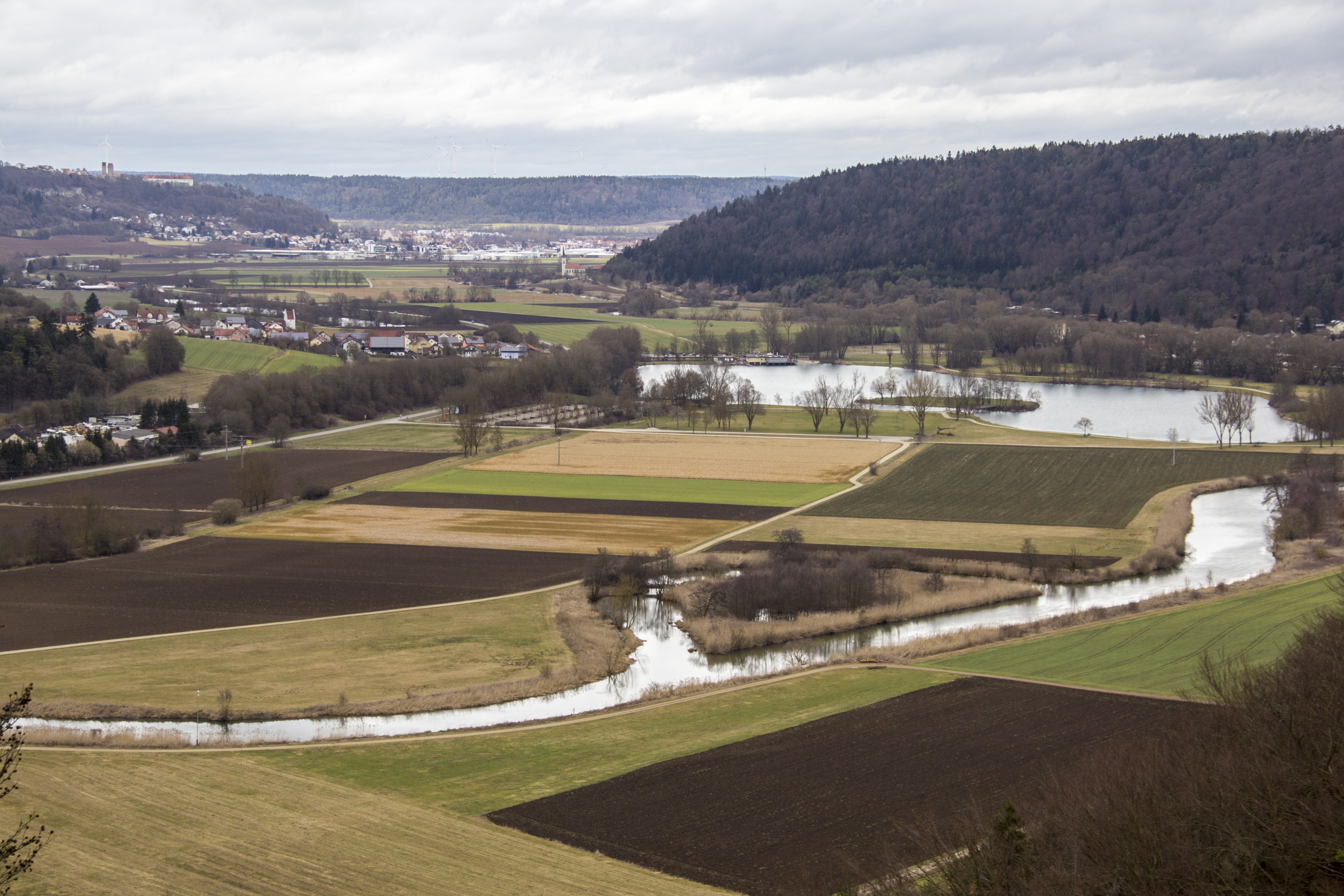 Kratzmühle, Badesee